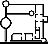 Grundriss des Schlosses Mespelbrunn